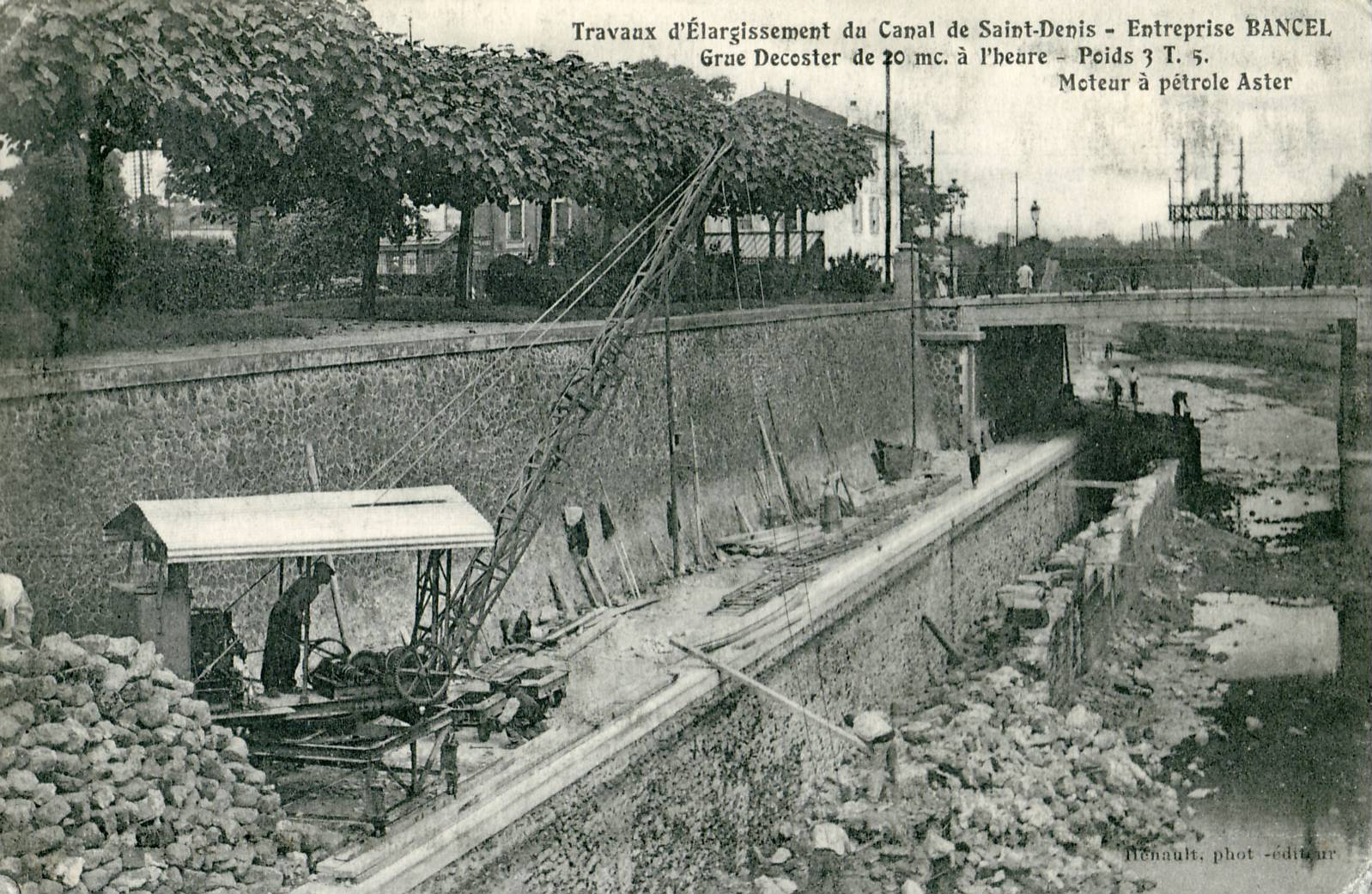 Carte postale ancienne éditée par Pichault Travaux_d'élargissement du Canal de Saint-Denis -Entreprise Bancel Grue Decoster, Moteur à pétrôle Aster